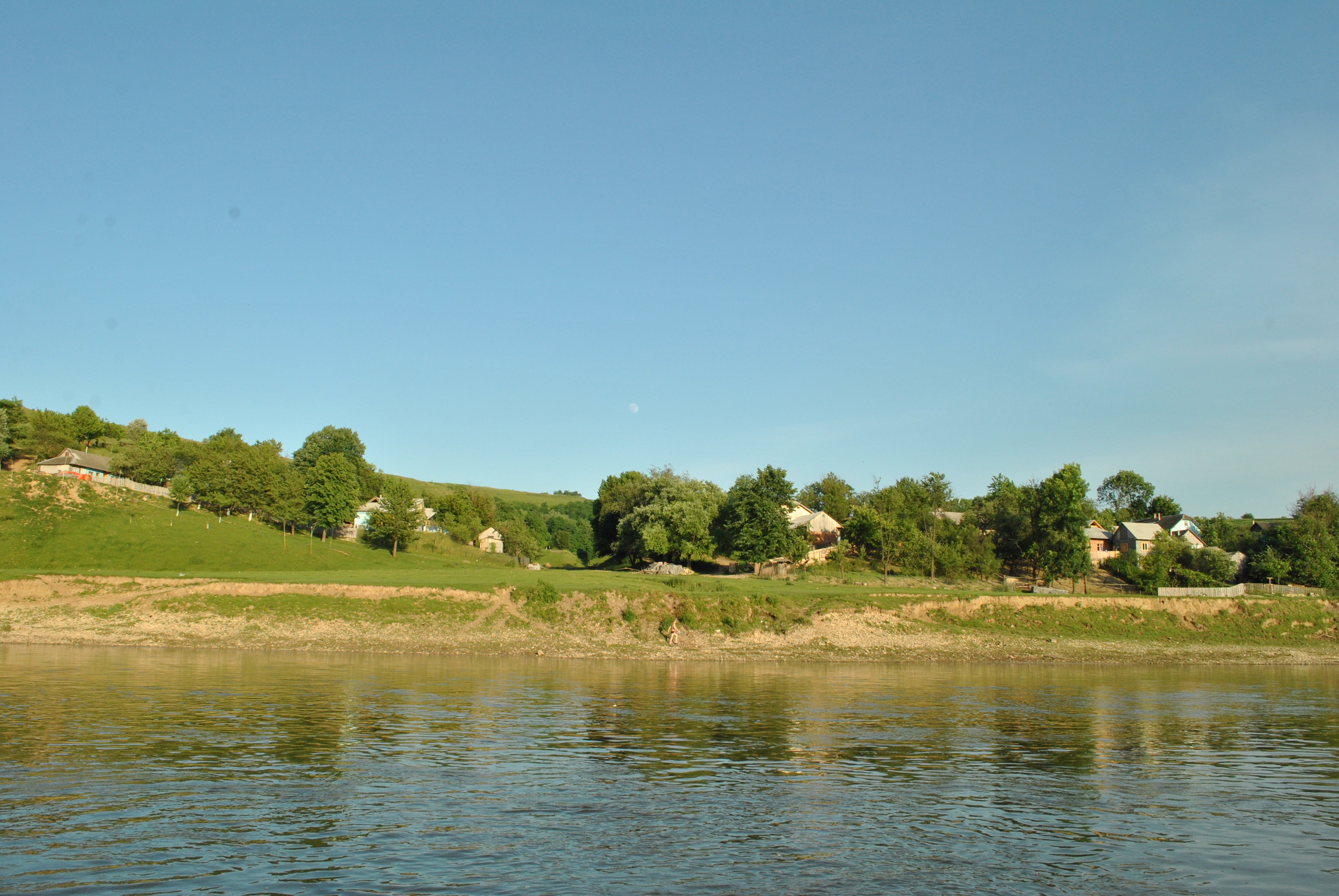 Вигляд на с. Будзин Тлумацького району Івано-Франківської області з Дністра.